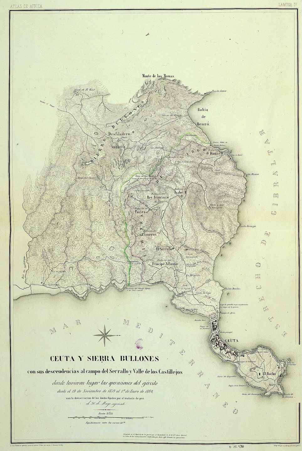 Pertenece a: "Atlas histórico y topográfico de la Guerra de África sostenida por la nación española contra el imperio marroquí en 1850 y 1860. - Madrid : Depósito de la Guerra, 1861". Es la lámina IV Escala expresada también en leguas y pies Orientado con rosa con el N. al E. del mapa. - Relieve por curvas de nivel que mantienen una equidistancia de 10 m